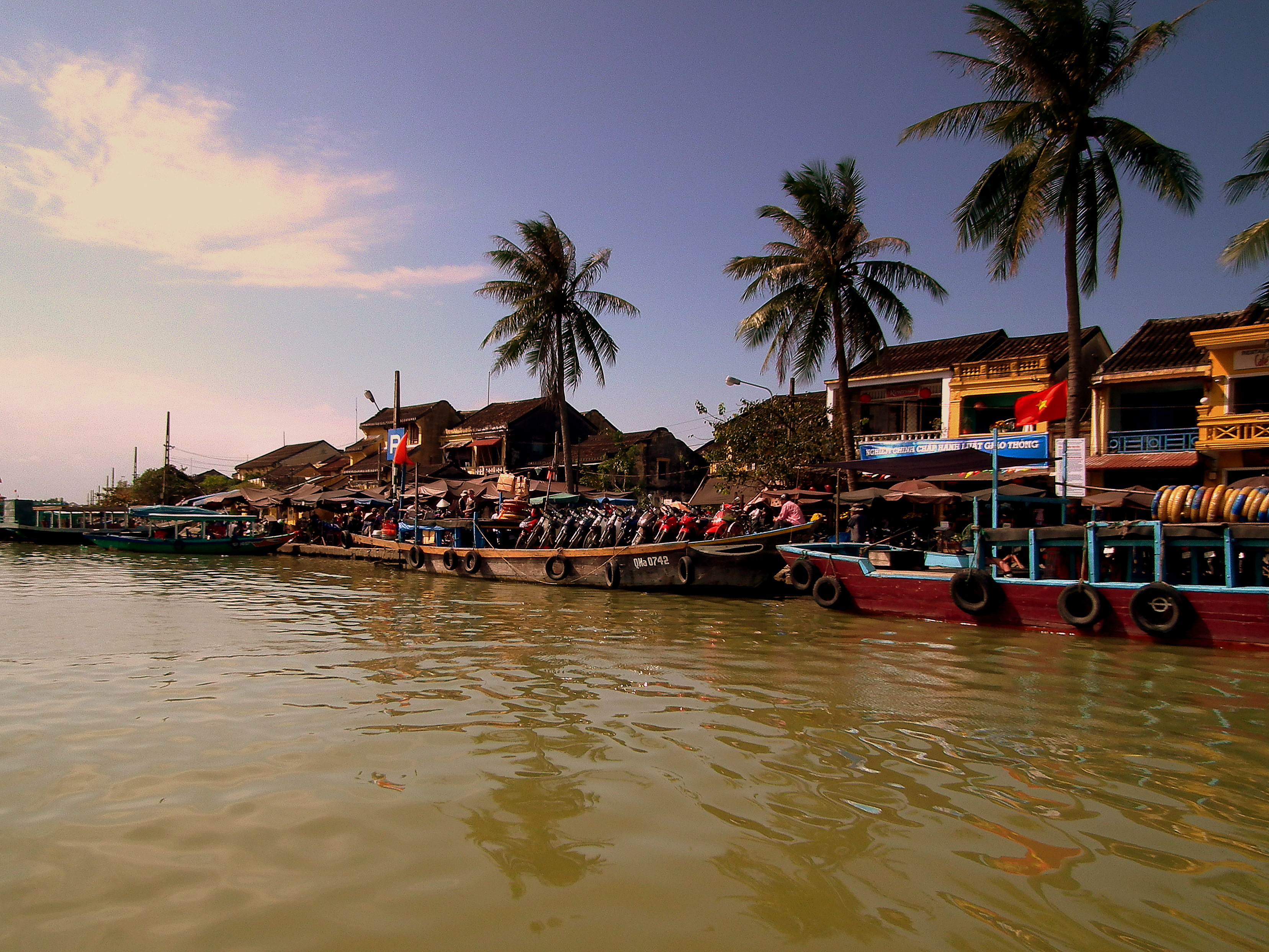 HOI AN VIETNAM FEB 2012